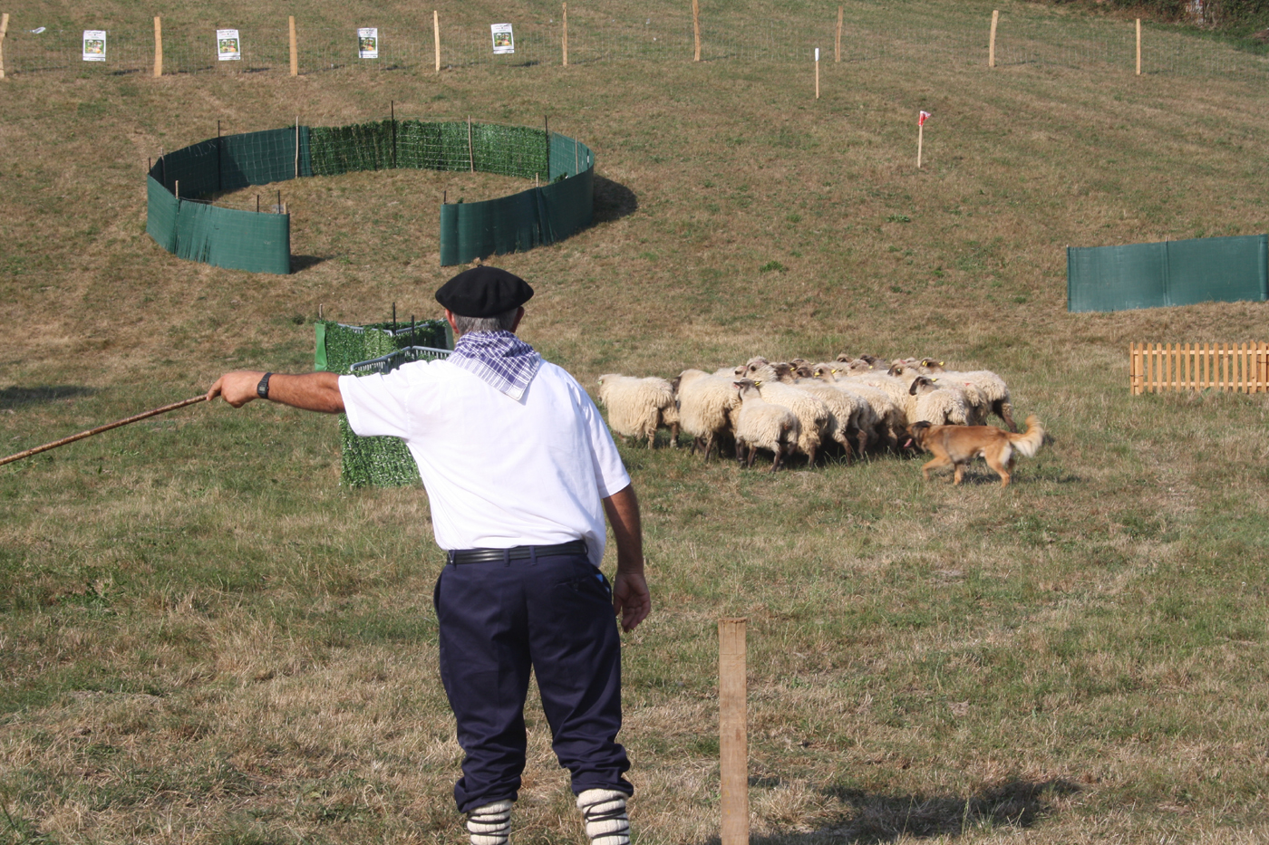 Artzaina ardiekin